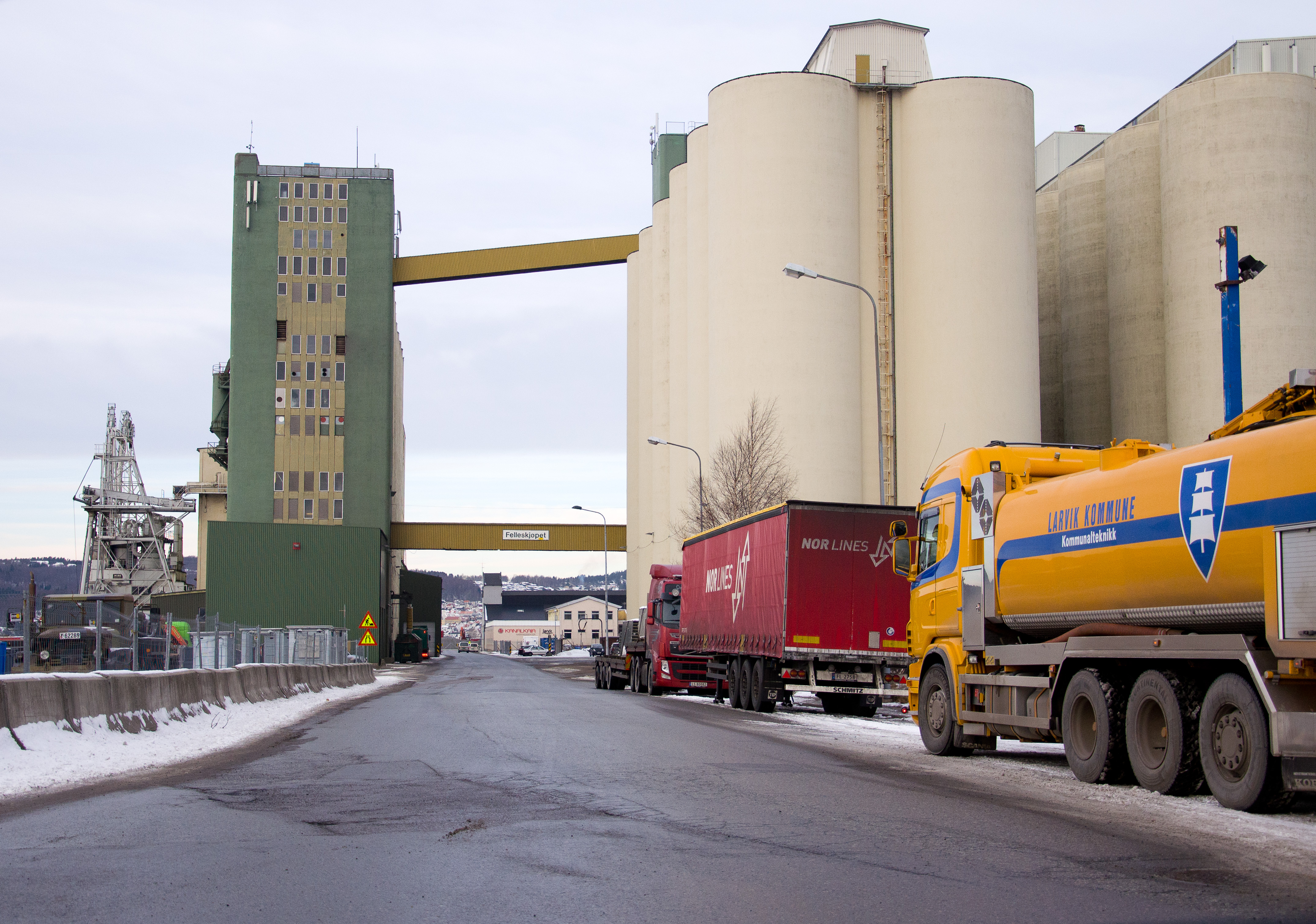 Vestfolds fylkesvei 101 Kanalgata i Larvik